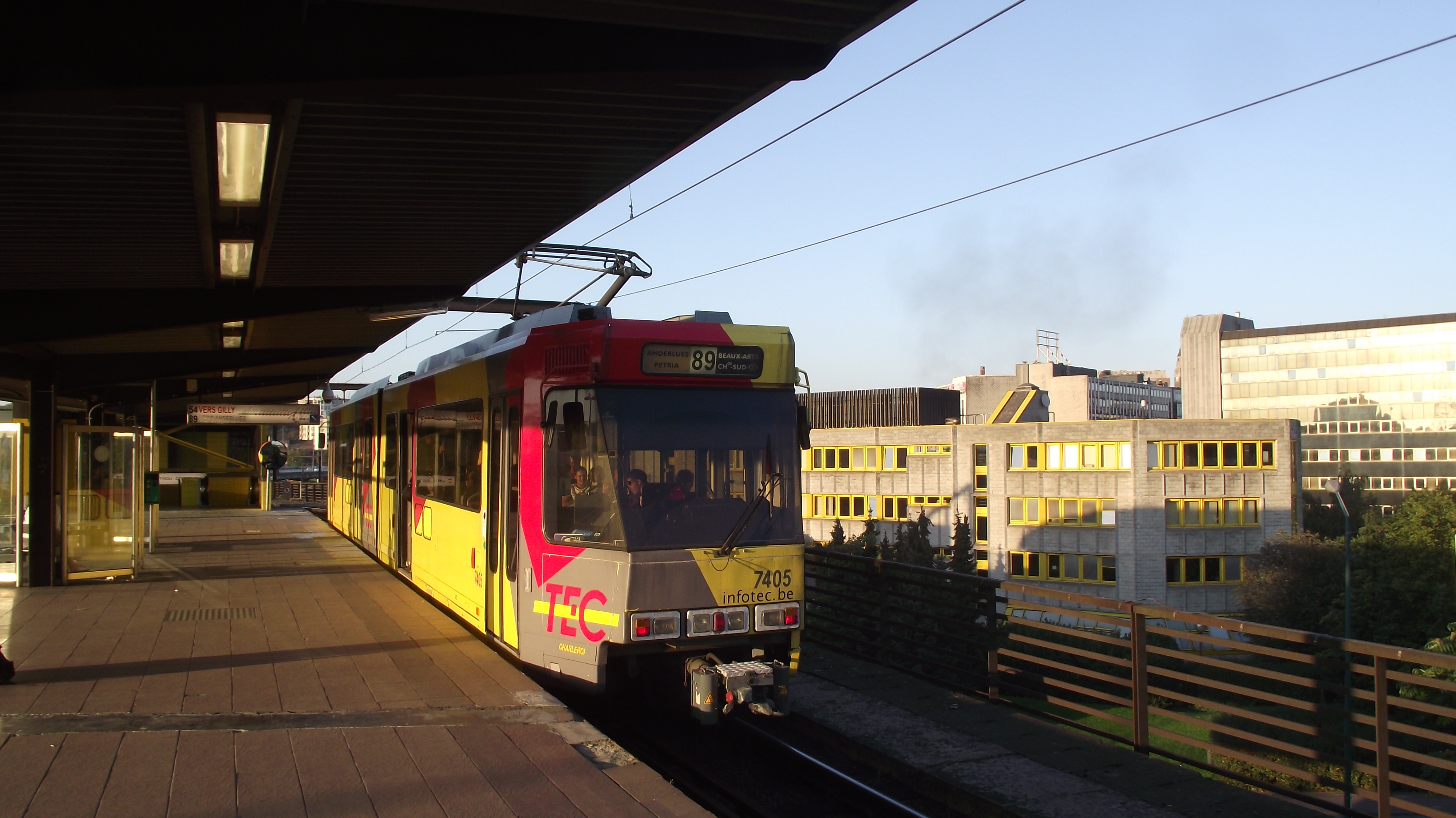 TEC tram aan de Vilette halte. Het gebouw met de gele ramen is het TEC Charleroi hooftkantoor gebouwd op de plaats van de vroegere stelplaats.